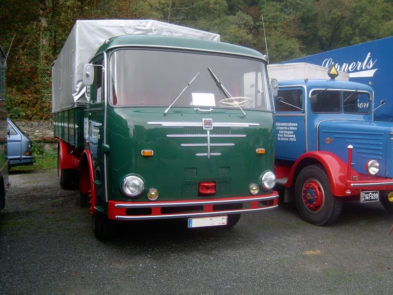 Büssing Commodore U (fotografiert in Weilburg 2005)